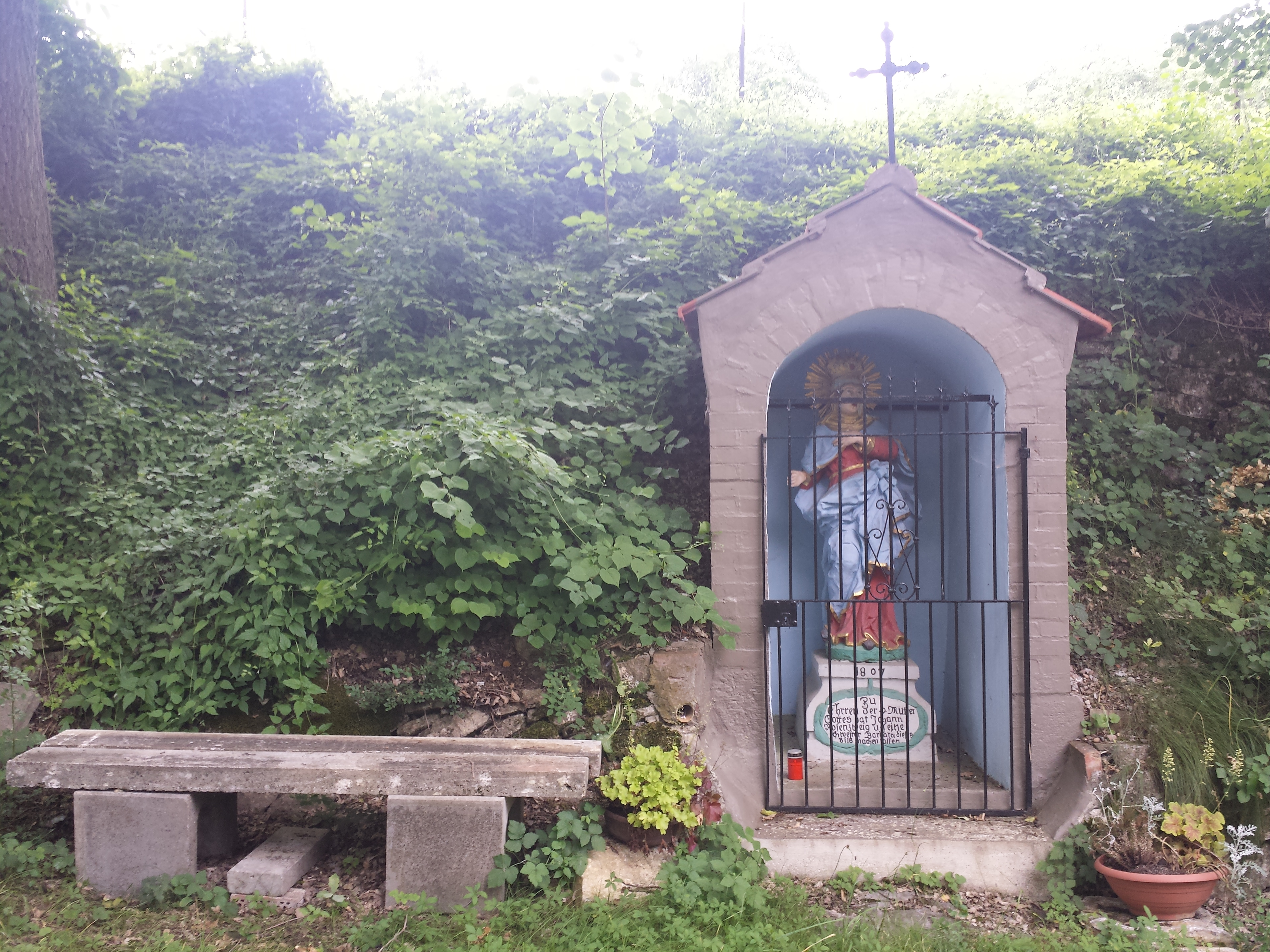 Ein Bildstock am Jakobsweg Main-Taubertal bei Grünsfeldhausen.